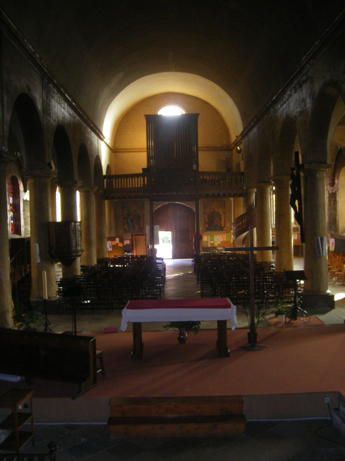 Saint-Aré church in Decize